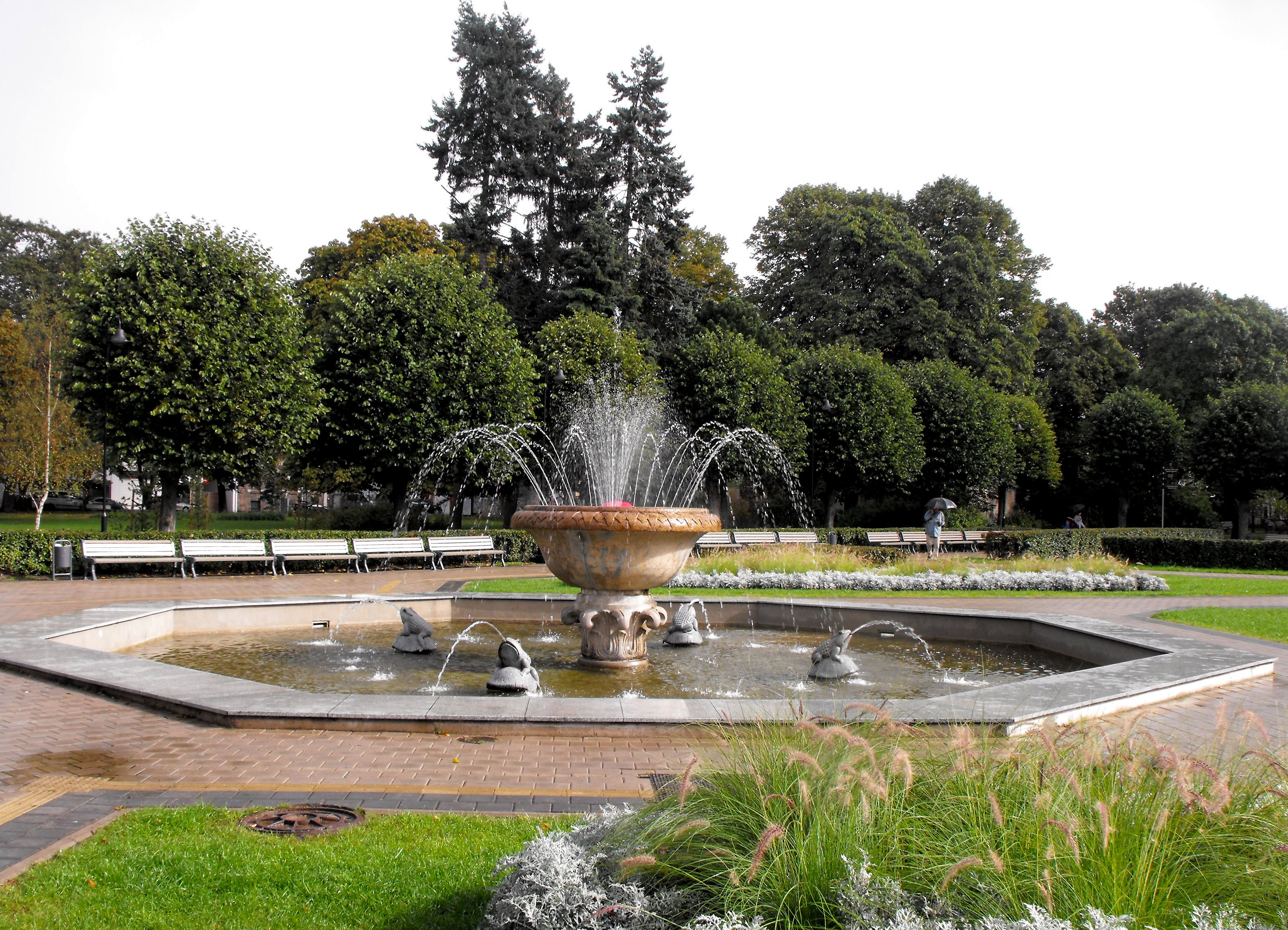 Ziedoņa parks un paviljons, Rīga, Aleksandra Čaka iela